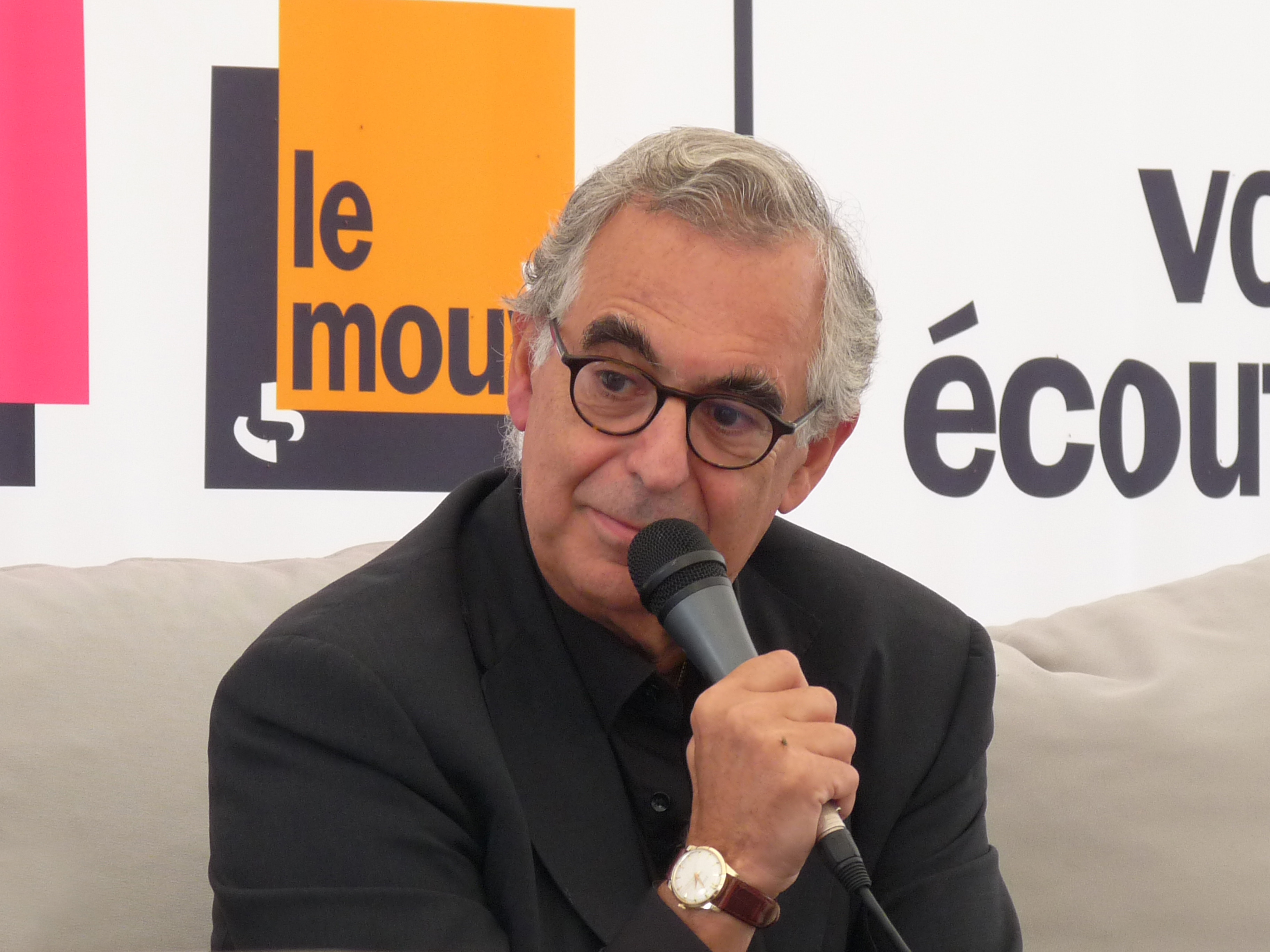 Metin Arditi présentant son ouvrage Le Turquetto dans le cadre du "Livre sur la Place" à Nancy en septembre 2011.